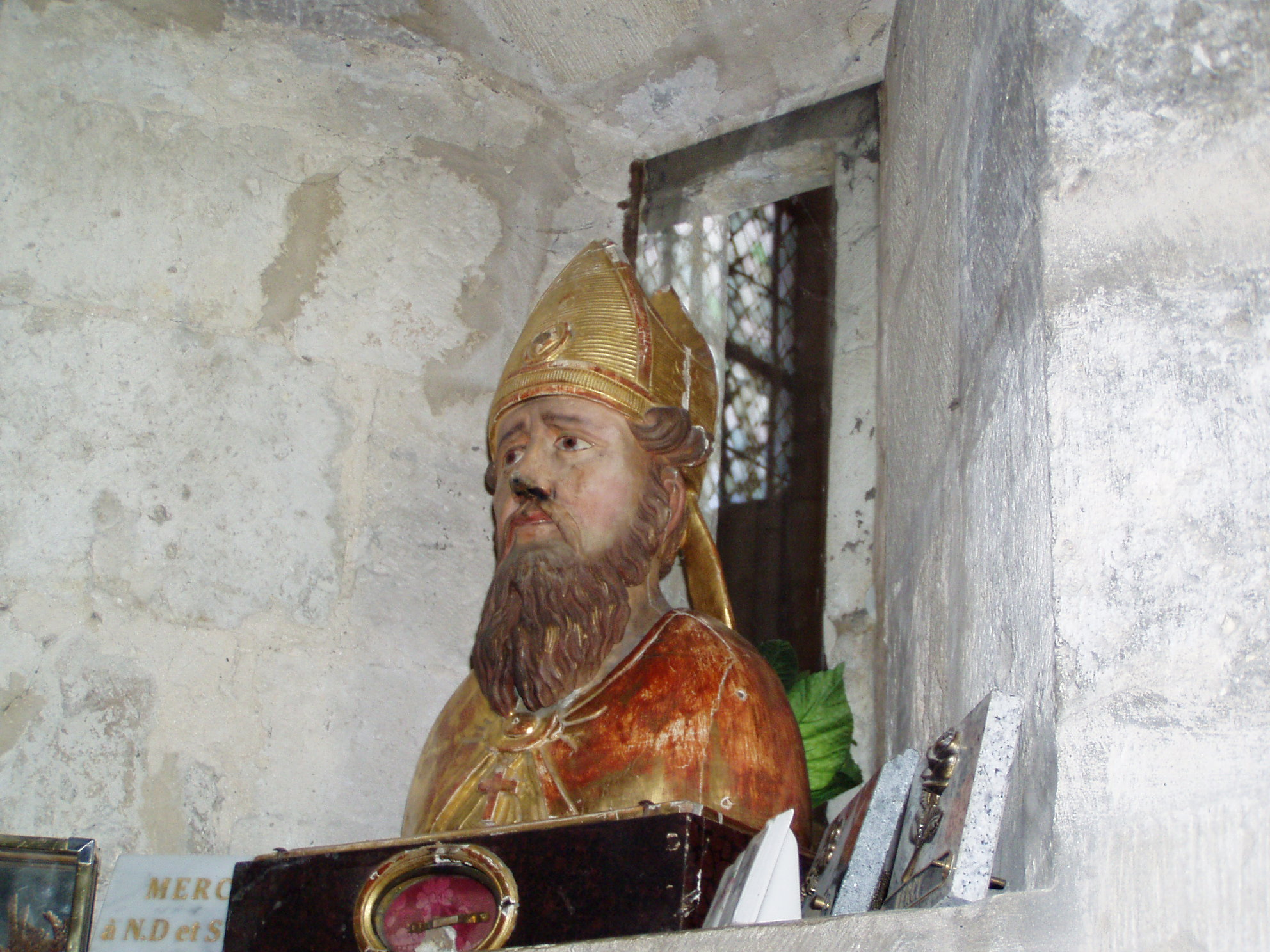 Buste reliquaire de Saint Sulpice dans l'église de Saint-Sulpice-de-Favières dans l'Essonne (France)